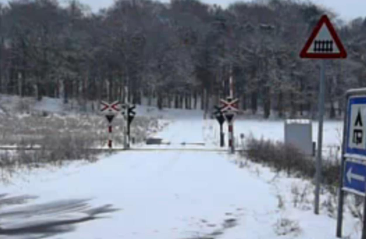 Bahnübergang in Langebjerg